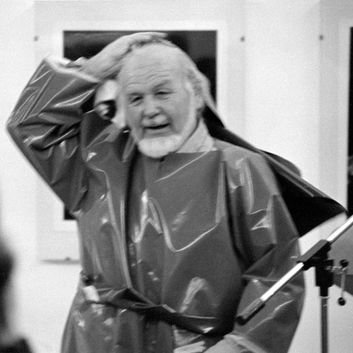 Pan Walther zu seinem 65sten Geburtstag im Ostwallmuseum Dortmund 1986